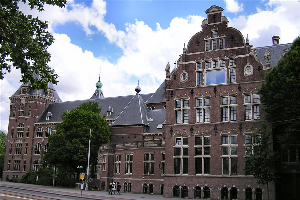 Photo que j'ai prise le 14 mai 2007 BRUNNER Emmanuel (manu25)